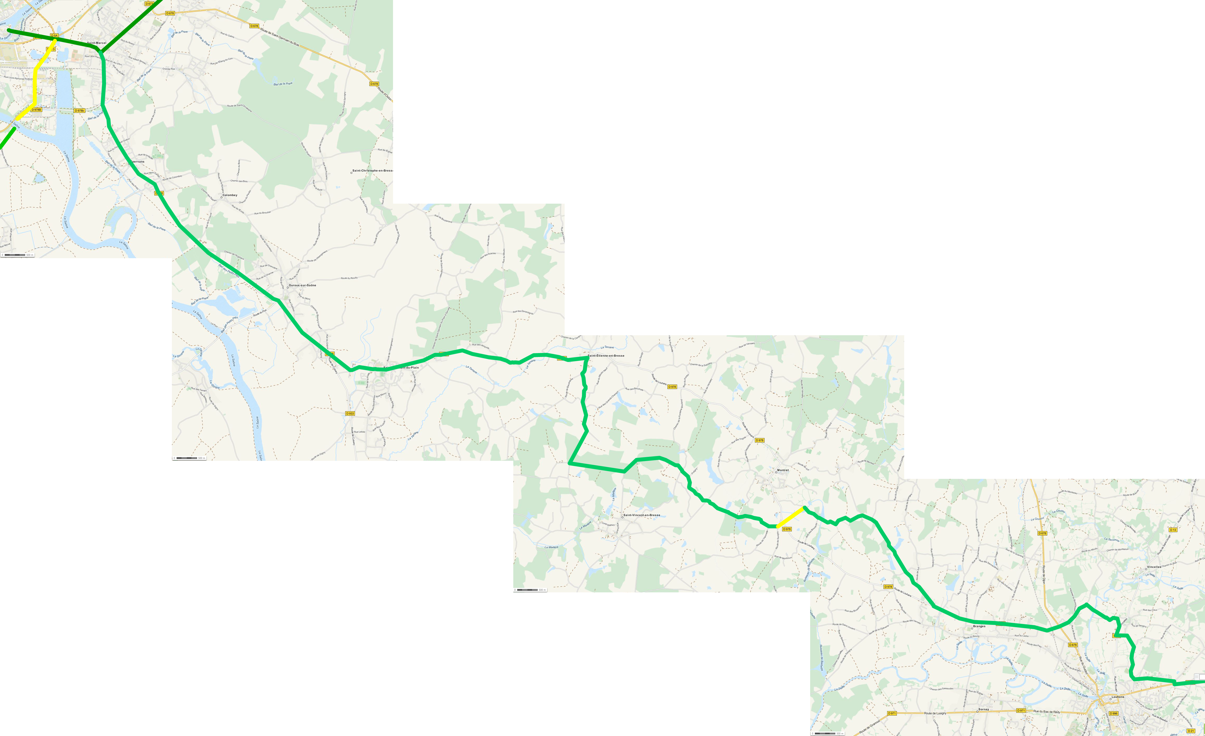 Karte der Römerstrasse von Chalon-sur-Saône nach Lons-le-Saunier, Teilstück Chalon-Louhans Carte de la voie romaine de Chalon-sur-Saône à Lons-le-Saunier, partie Chalon-Louhans This map may be incomplete, and may contain errors. Don't rely solely on it for navigation.